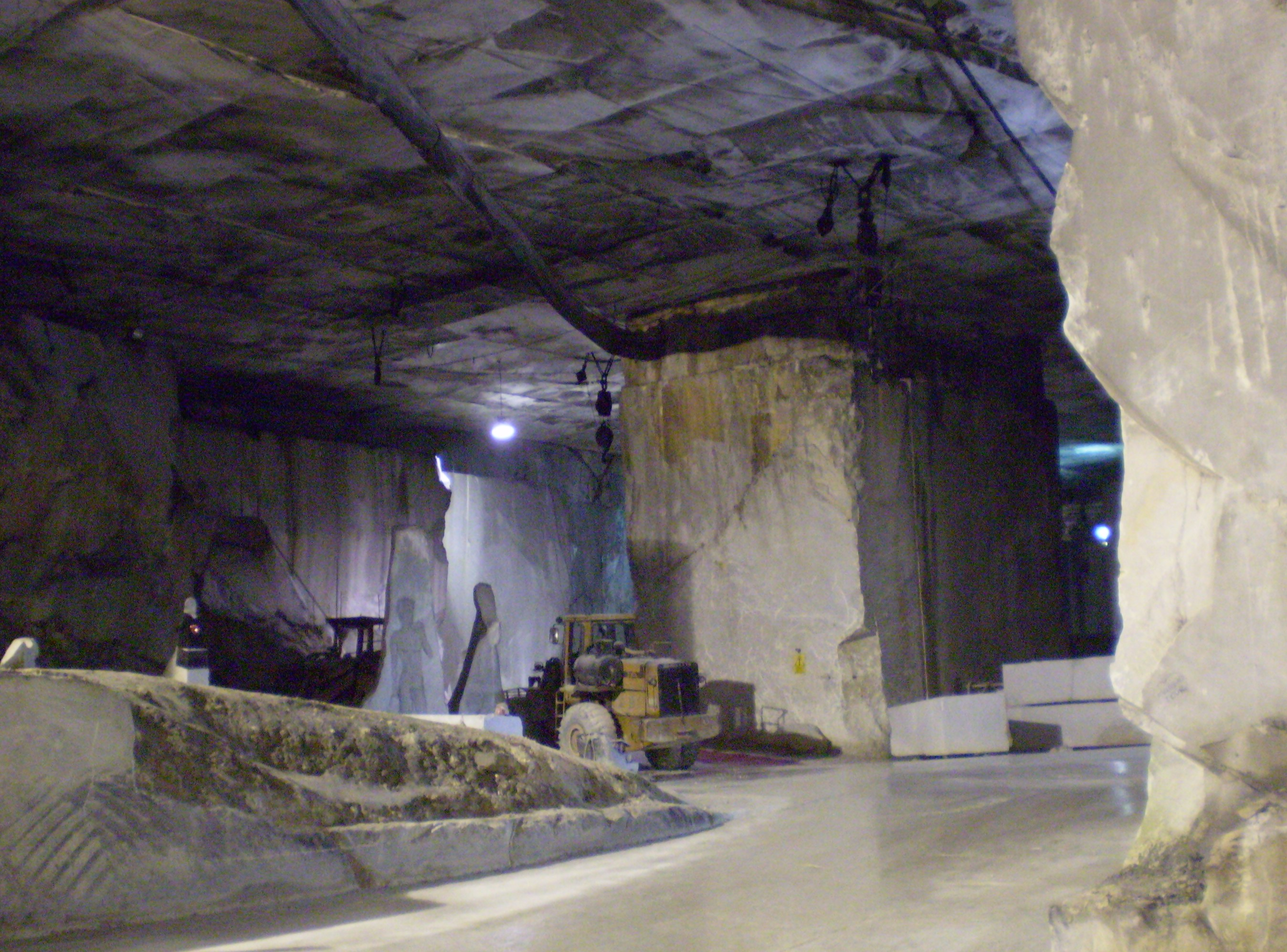 Marble quarry at Carrara, Province Massa-Carrara, Italy. Bacino di Fantiscritti, Galleria Ravaccione